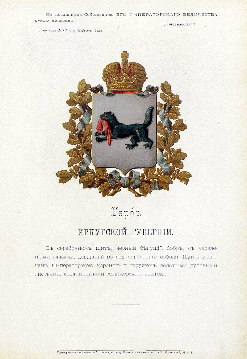 Official Russian Empire coat of arms Irkutsk Governorate. Герб Российской Империи Иркутской губернии с официальным описанием в Гербовнике МВД Российской Империи 1880 года. Утверждён Императором Всероссийским Александром Вторым 5 июля 1878 года. В данном описании герба бабр (уссурийский тигр) превратился в бобра и стал "геральдическим бабром".